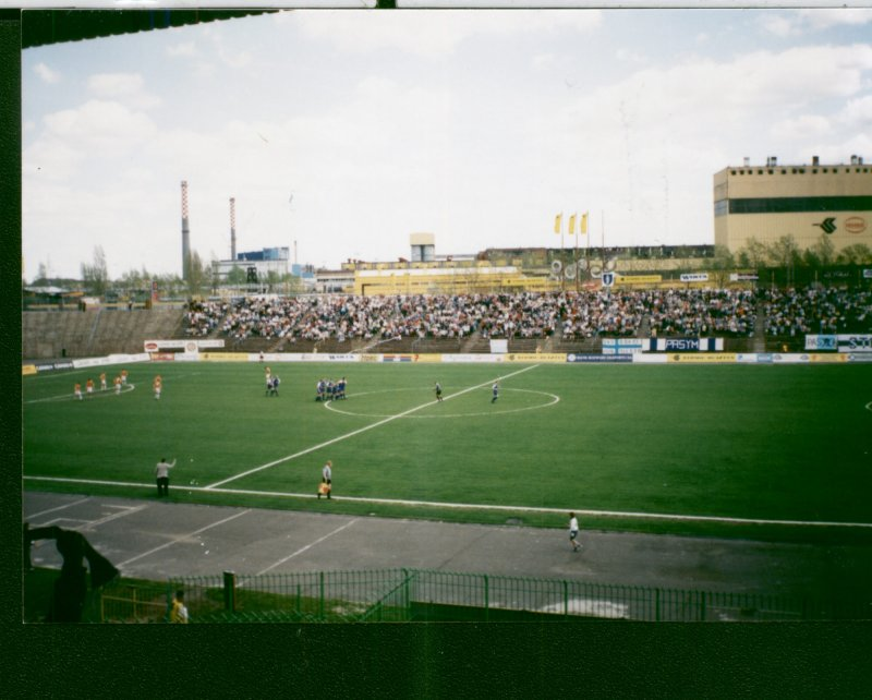 Zdjęcie pochodzi ze spotkania rozegranego w 1997 roku w Olsztynie, pomiędzy Stomilem a Hutnikiem Kraków. Wykonane zostało z trybuny krytej stadionu.